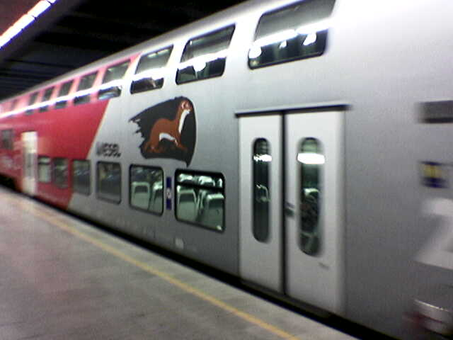 Description: Vienne, train express régional type RER, dessert toutes les grandes gares de Vienne, et les villes les plus proches en Basse-Autriche, Tchéquie, Slovaquie et Hongrie. Date: 2004 Licence: photographie par Witoki sous